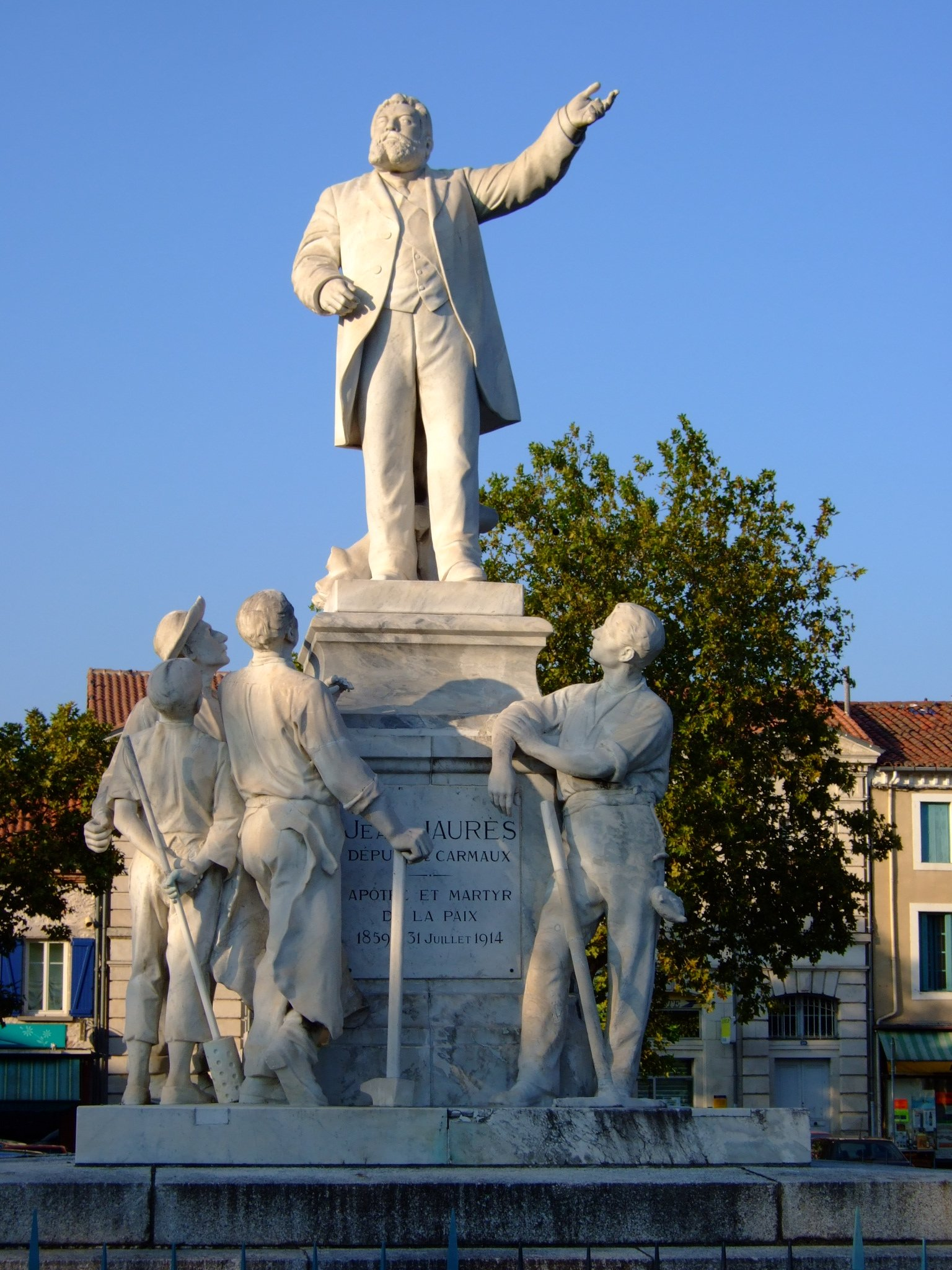 La statue de Jean Jaurès place Jean Jaurès à Carmaux. Photo amateur prise par moi-même.